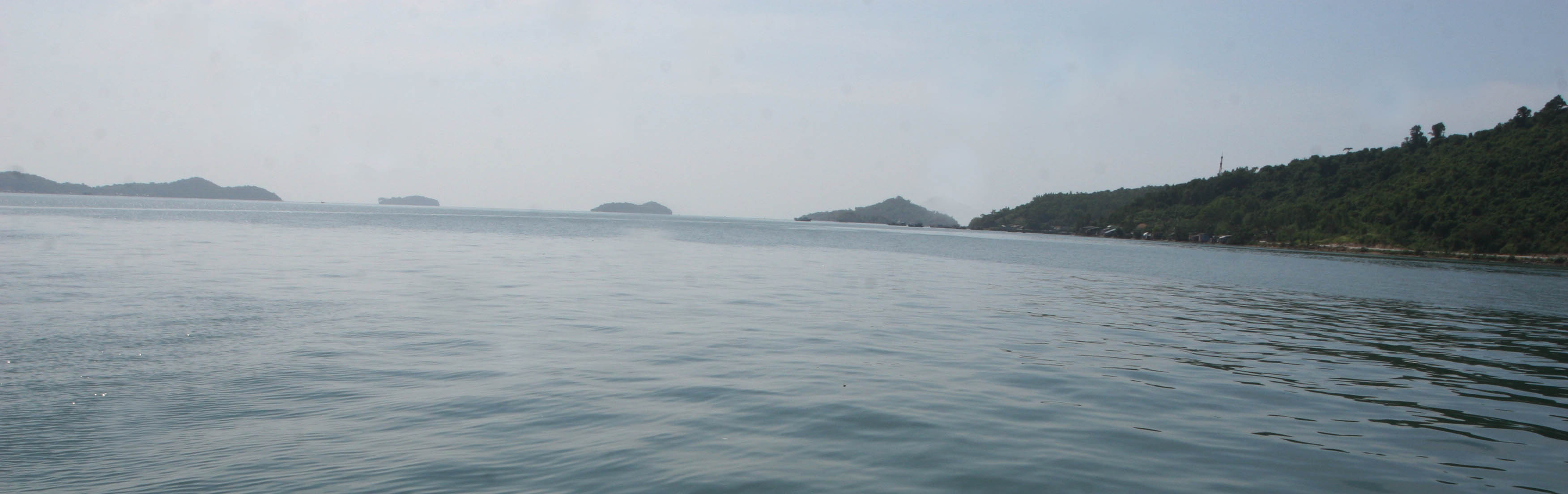 Quang cảnh một phần quần đảo Hà Tiên.